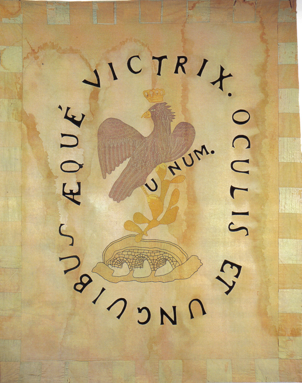 Flag Of Morelos